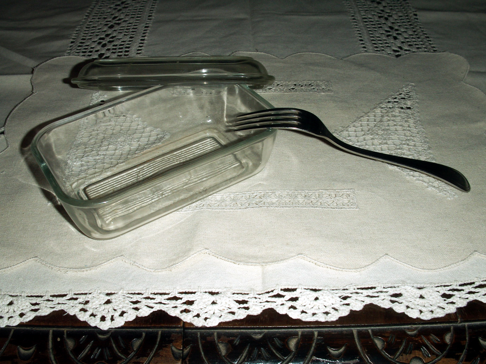 Conserva acciughe,portacciughe sott'olio